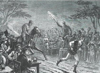 Fritz Käpernick im Wettkampf mit einem Rennpferd, Zoo Leipzig, 1881